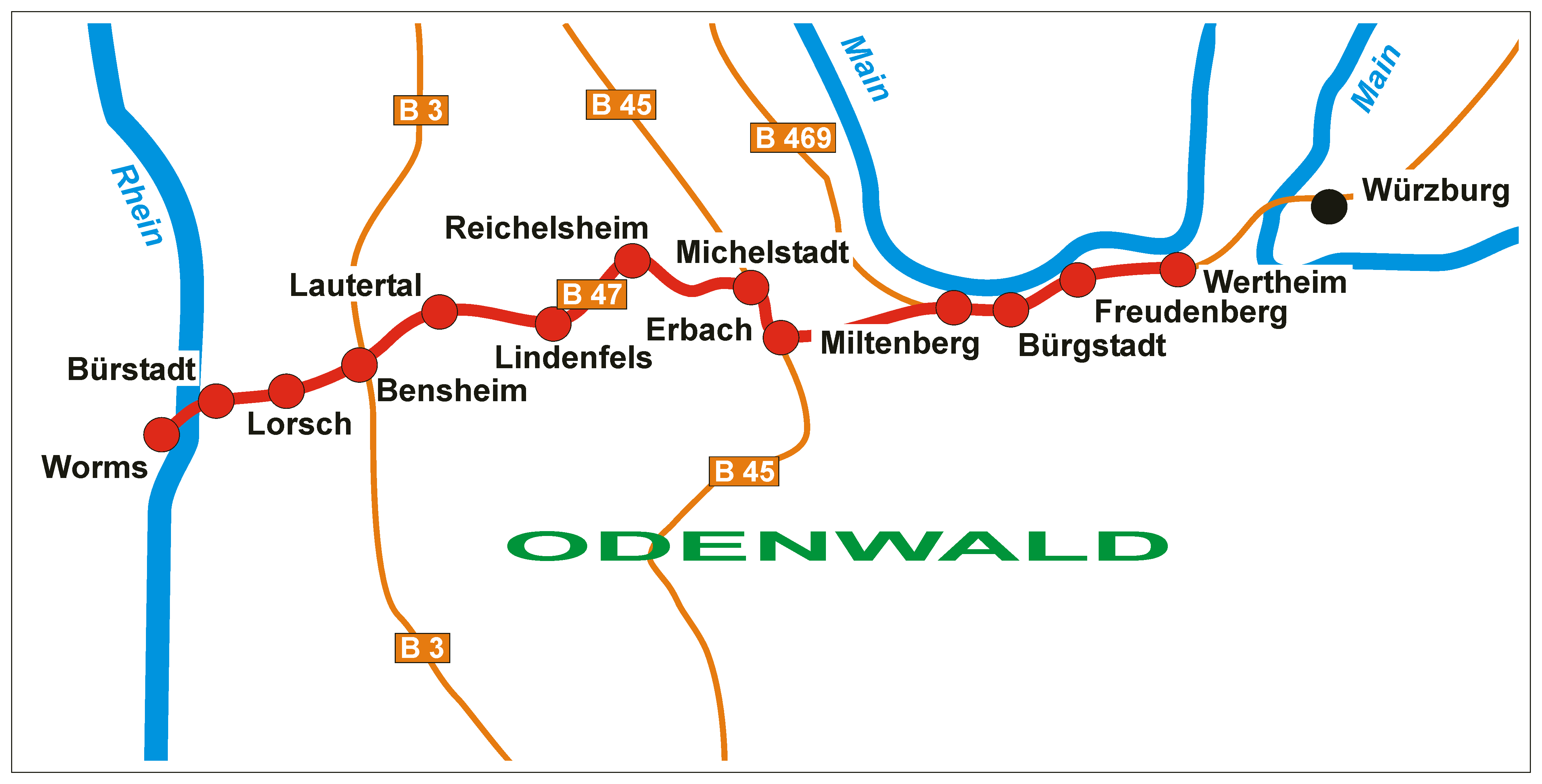 Verlauf der Nibelungenstraße Fotograf: presse03, selbst erstellt 2005 Lizenz: GNU-FDL